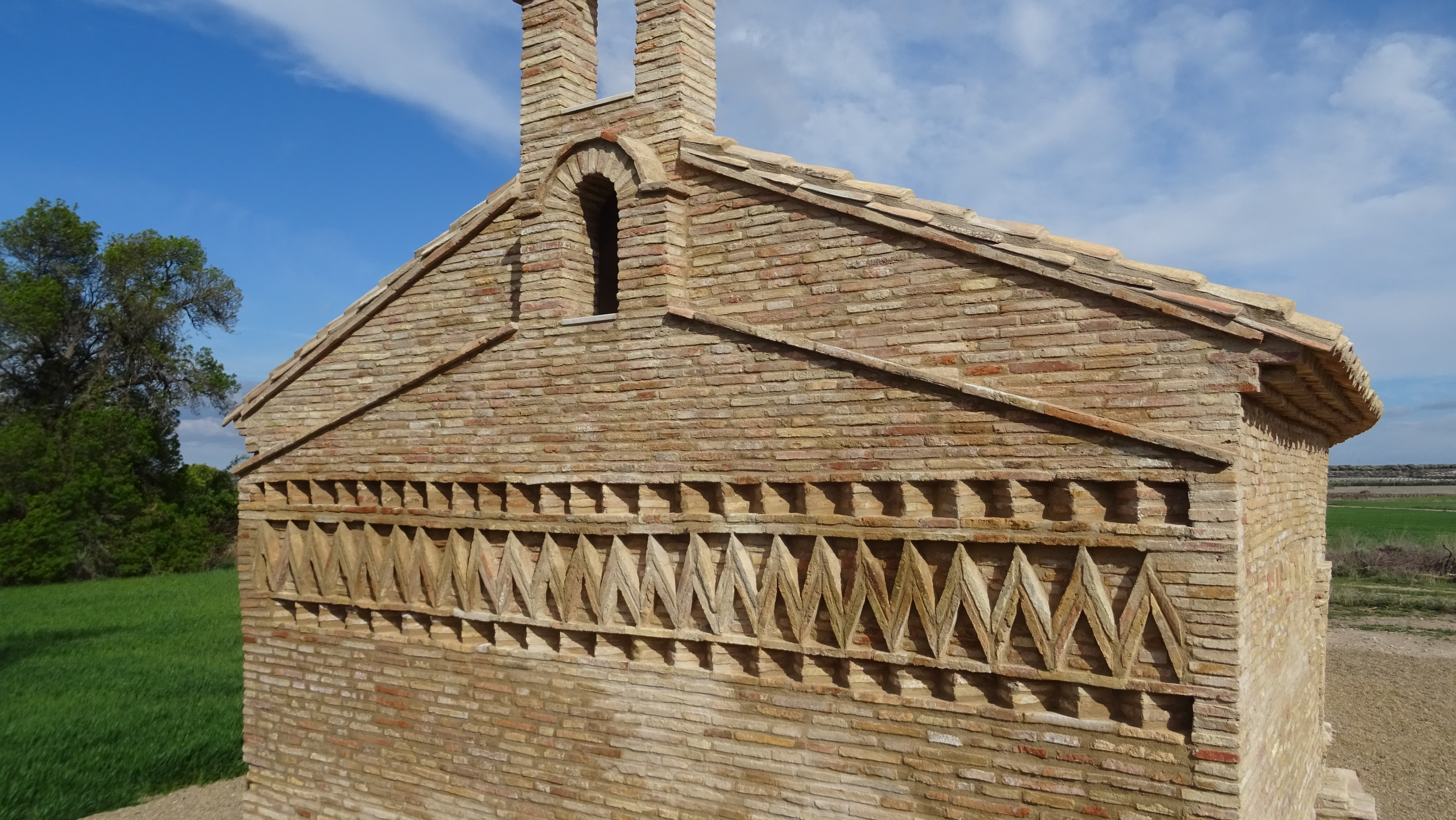 Aragonés: ermita de Ganyarul dimpués d'a restauración de 2018